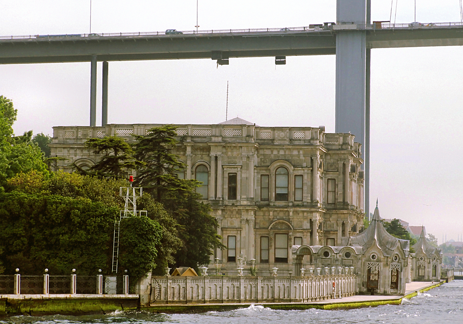 Stambuł, pałac Beylerbeyi; Istambul, Beylerbeyi palace